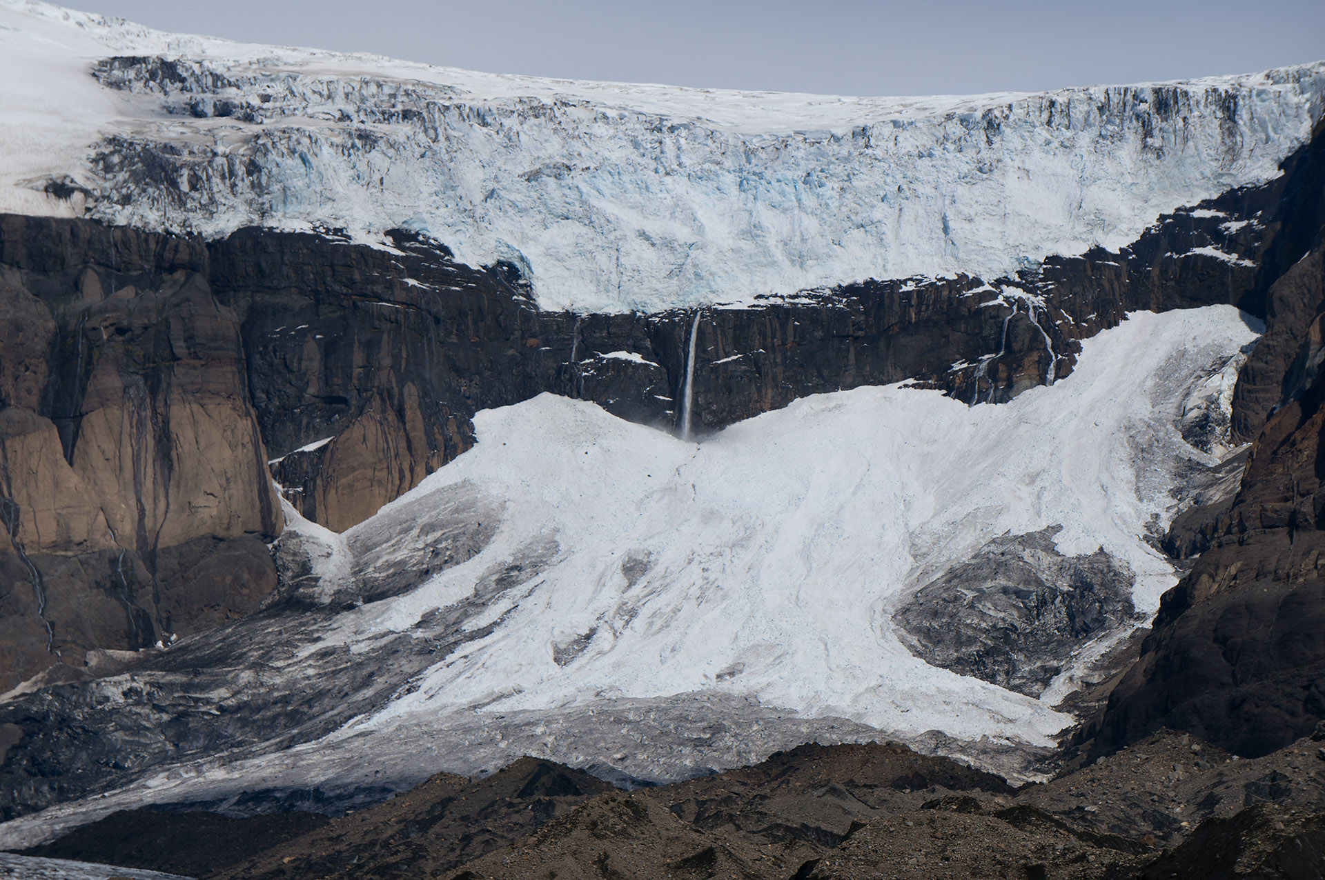 Morsárfoss